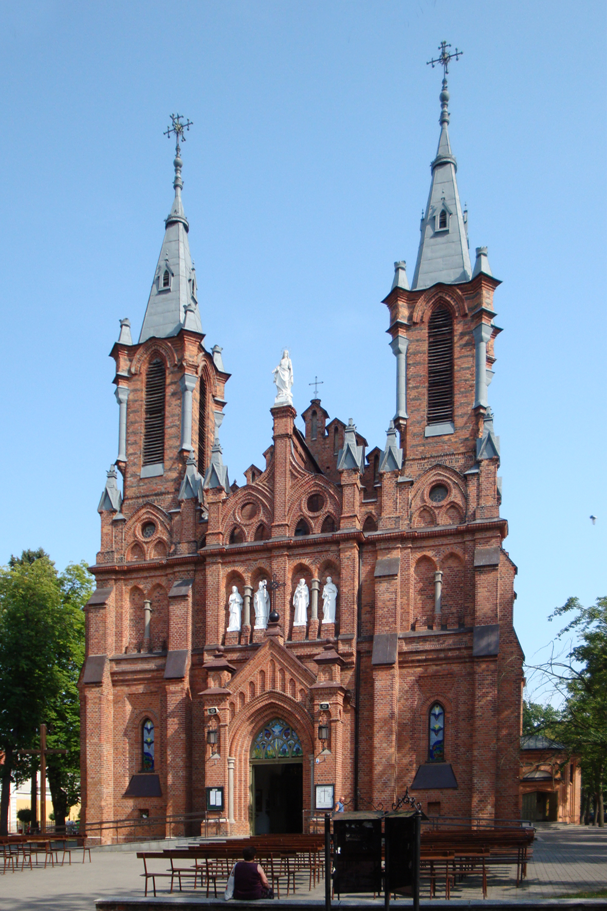 Ciechocinek, kościół par. p.w. śś. Apostołów Piotra i Pawła, 1873-1884